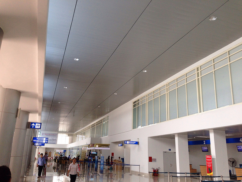 bên trong sân bay Phú Bài 2013